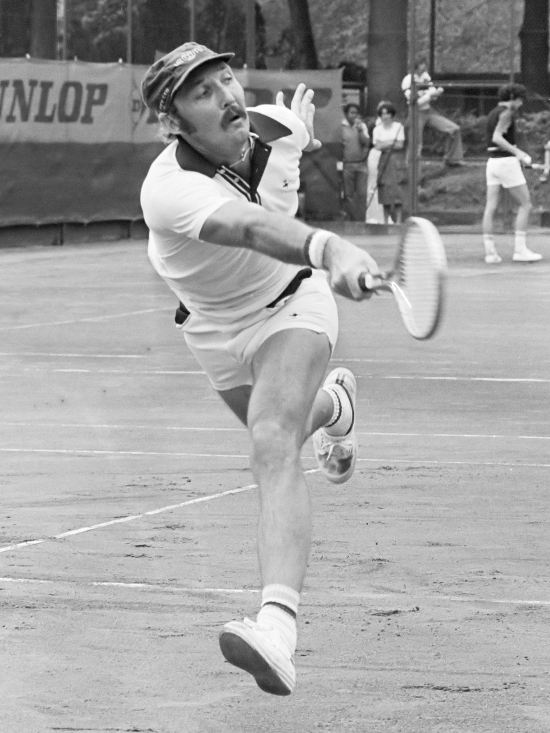 Internationaal tennistoernooi Melkhuisje in Hilversum; Australier John Marks in actie 13 juli 1977